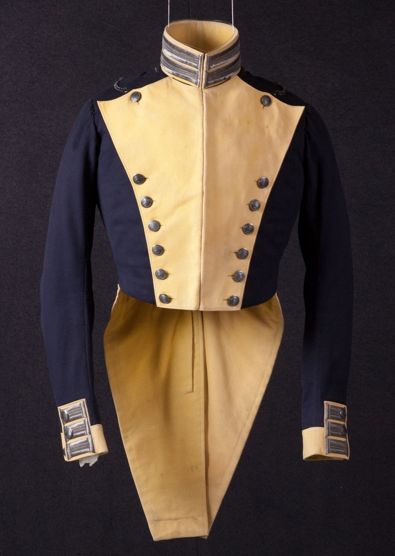 Frack m/1833. Har burits av givarens fader vid Svea garde. Gåva av M Rosenblad, 5/7 1881. Armémuseums inventarienummer: AM.023199